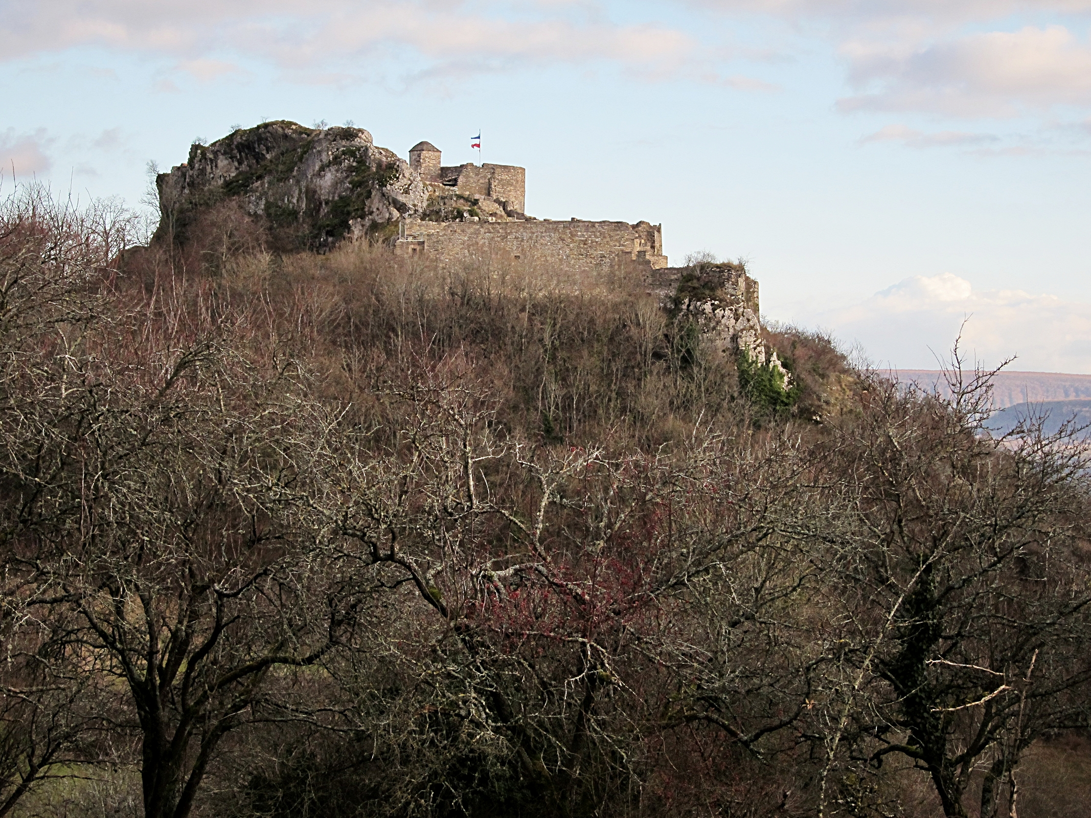 Le château de Mâlain (Côte-d'Or).